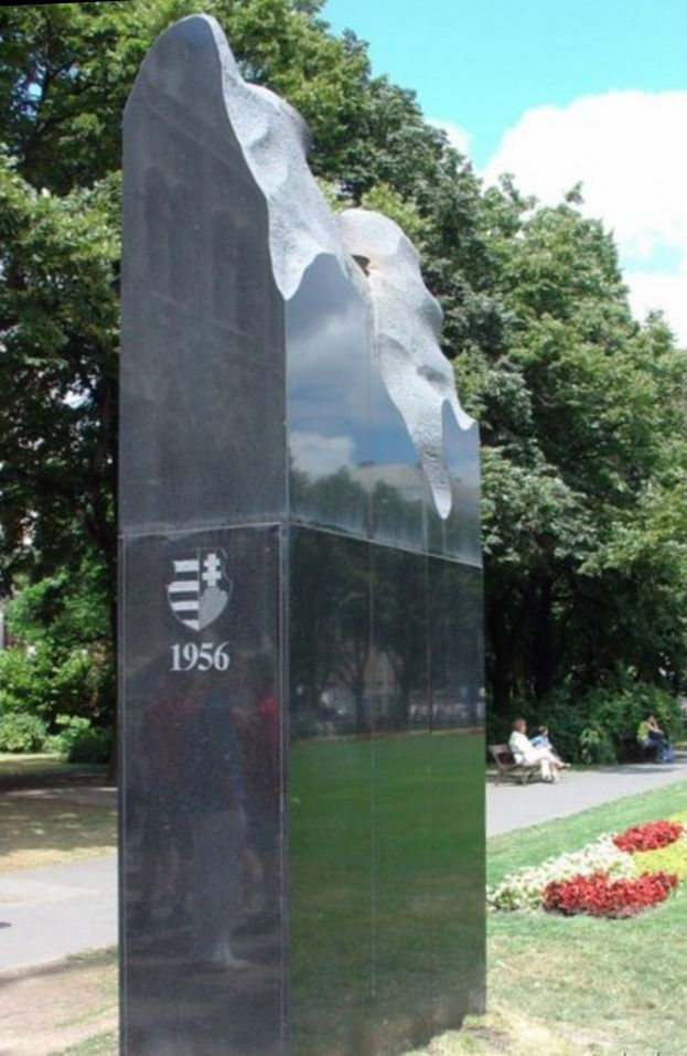 Lugossy Mária szobrász alkotása: A forradalom (1956) lángja címmel. Budapest, Kossuth tér. [1]